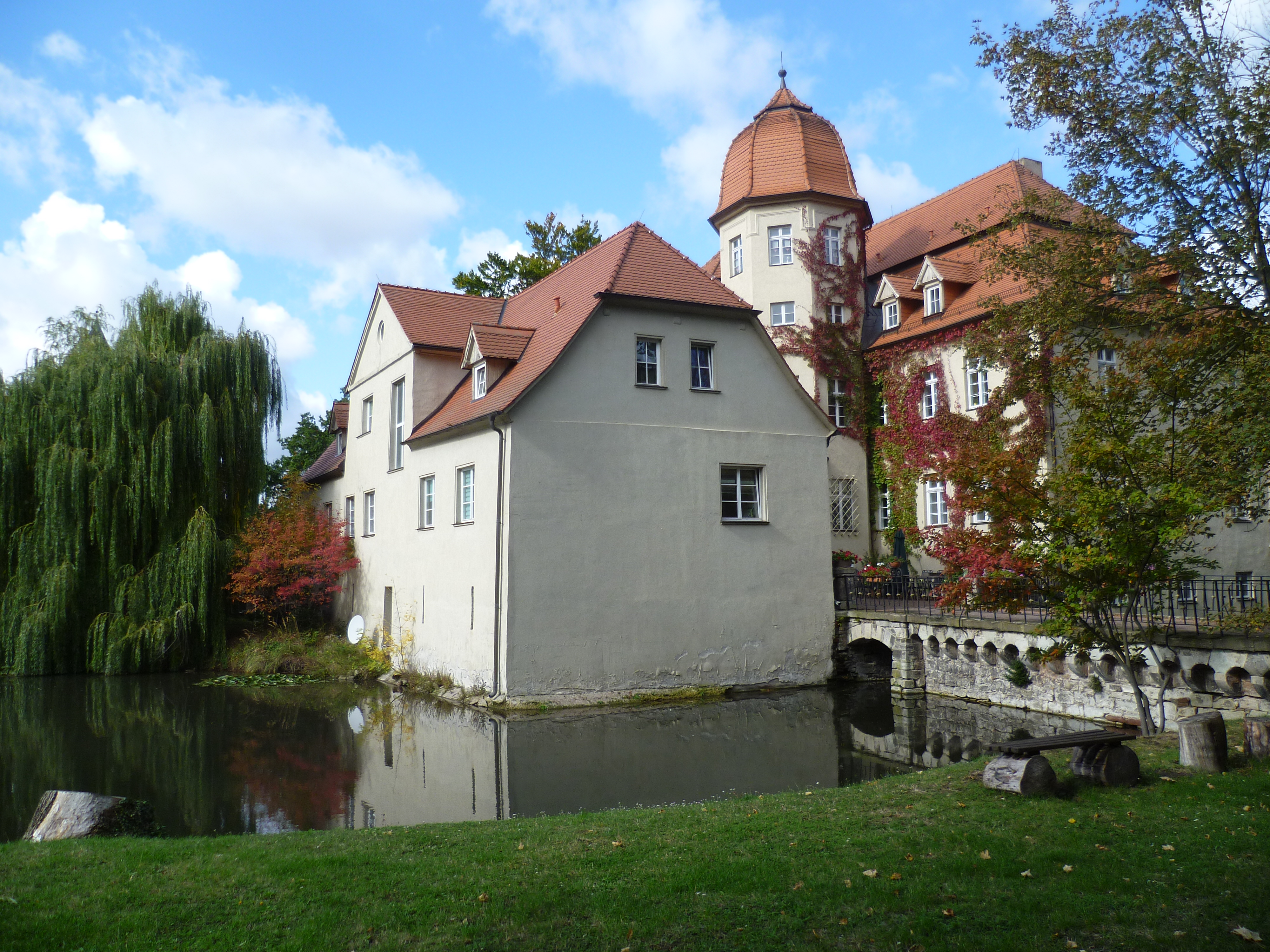 Großpaschleben-Wasserschloss (Oktober 2019)